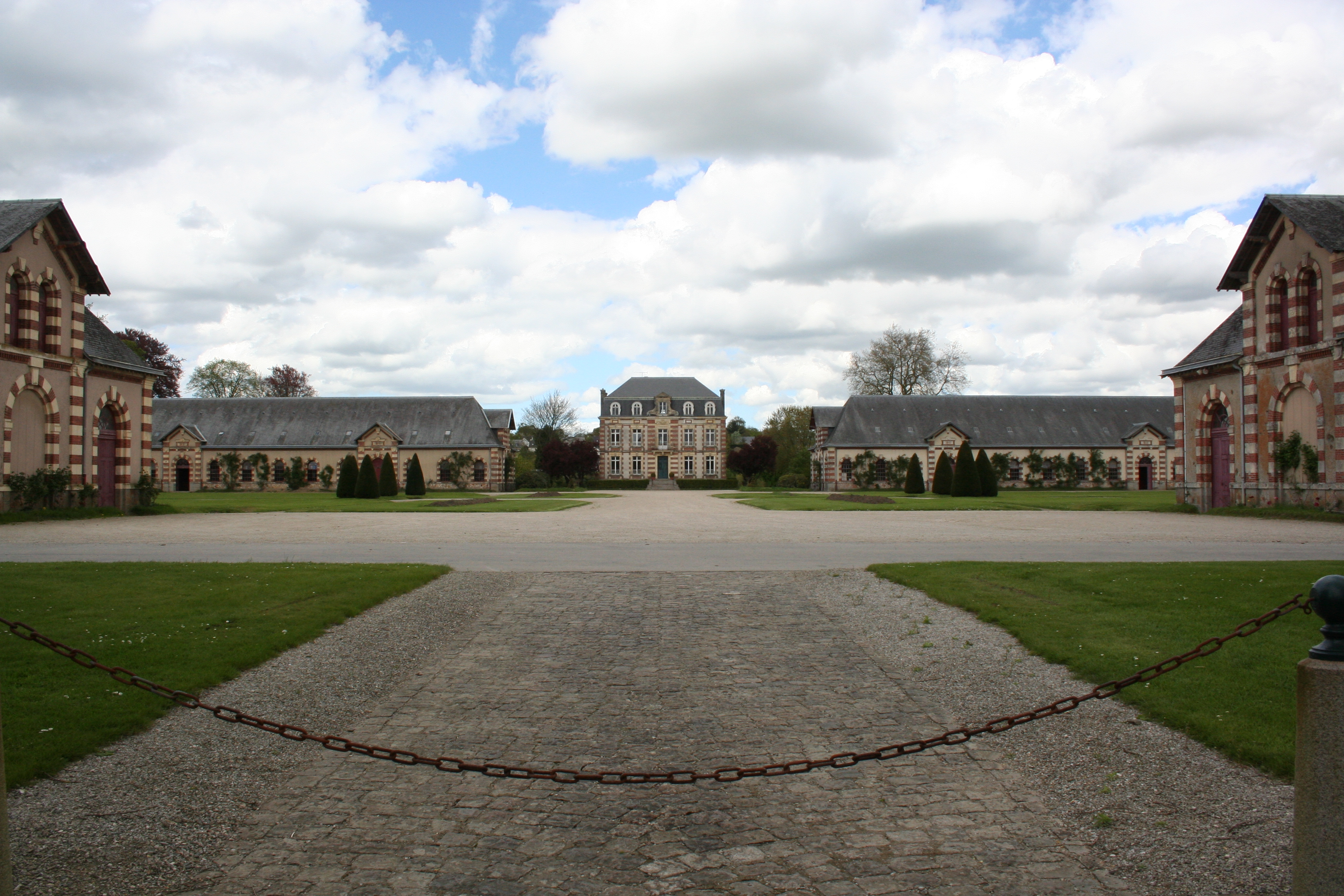 Haras de Saint-lô, ancienne maison du directeur, écurie 1, 4, 5 et 8 -10 -5 -3 -2 ◄ ► +2 +3 +5 +10